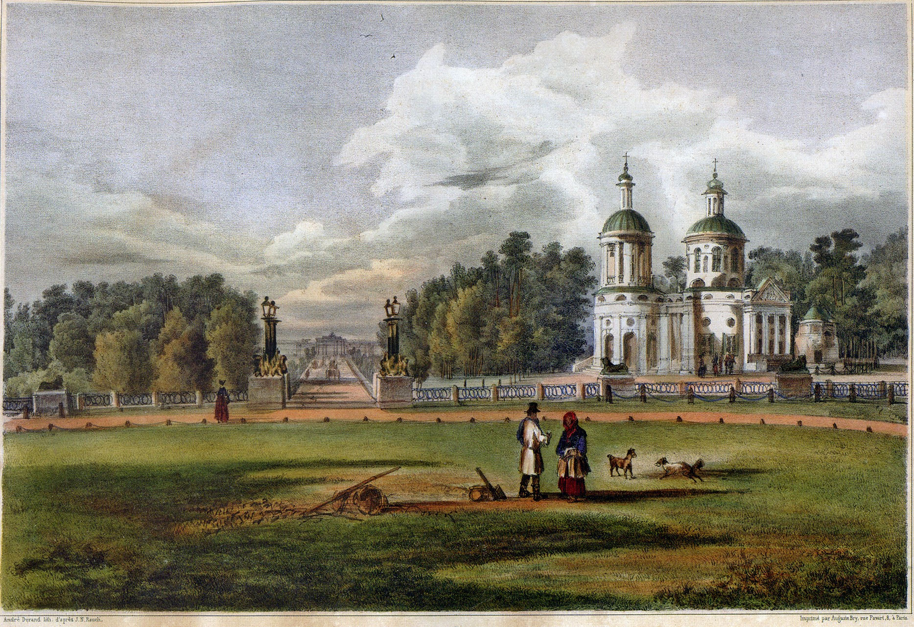 Siedlung Vlachernskoje-Kusminki